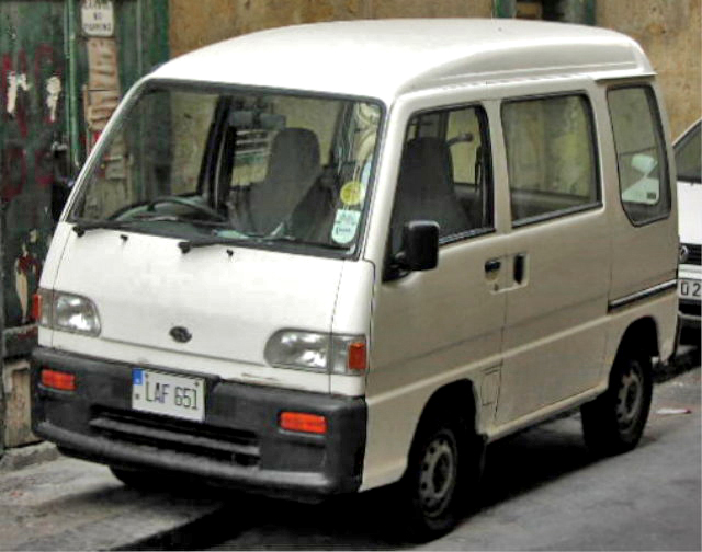 Subaru Sambar 1st Generation